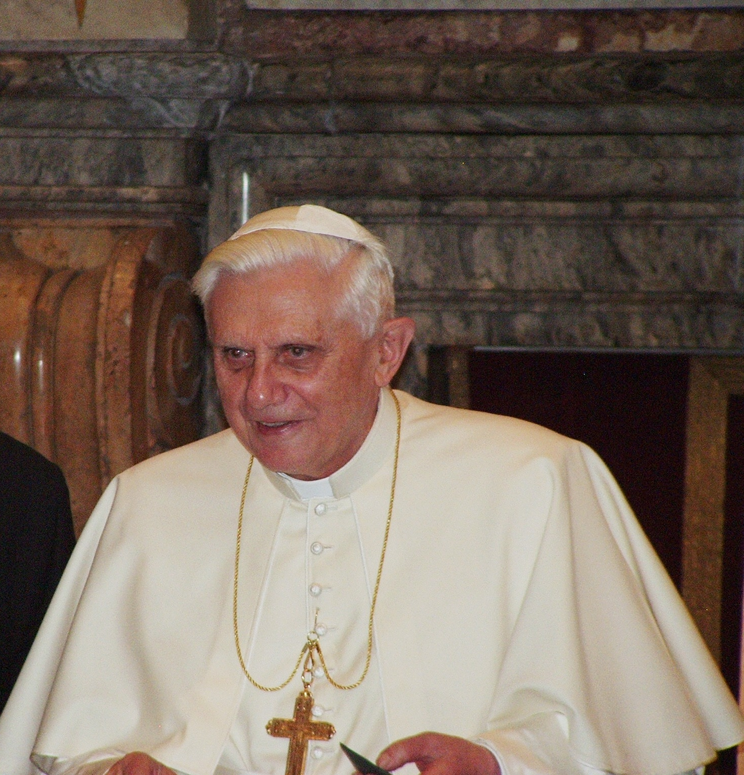 Pope Benedictus XVI at a private audience (january,20 - 2006)